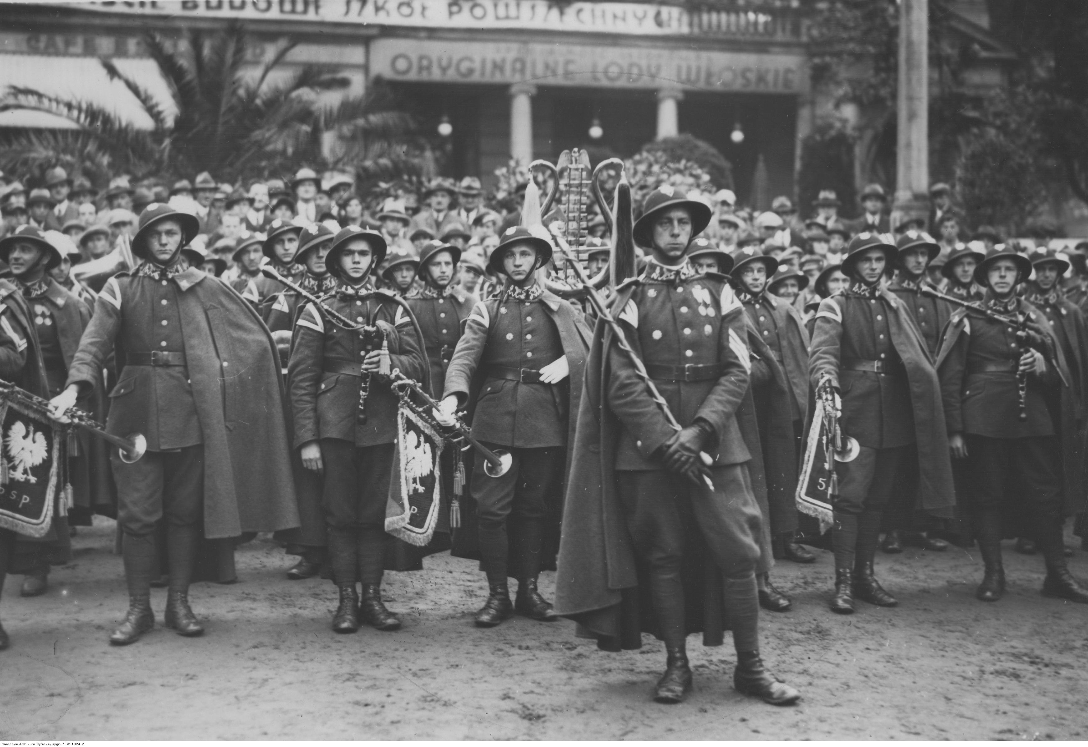 Wycieczka 5 Pułku Strzelców Podhalańskich do Poznania - orkiestra pułkowa na pl. Wolności; 1935 r. Koncern Ilustrowany Kurier Codzienny - Archiwum Ilustracji. Sygnatura: 1-W-1324-2